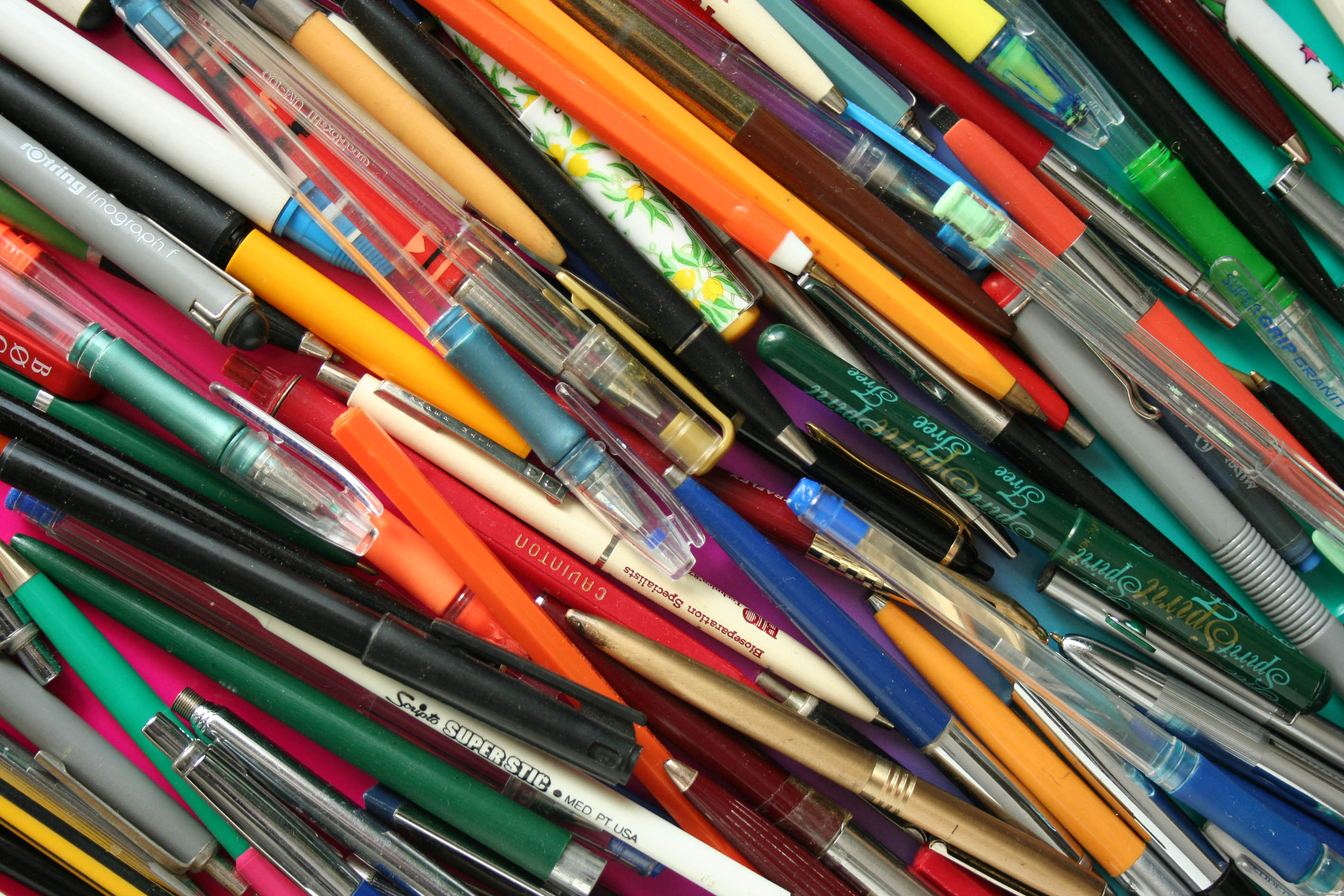 Golyóstollak az 1980-as évekből